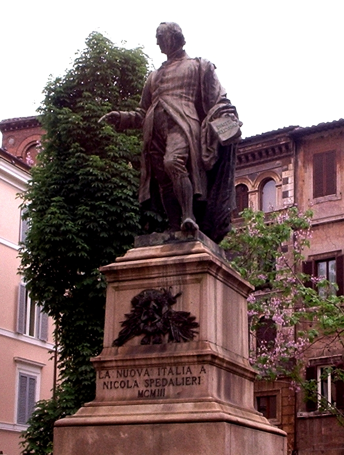 Nicola Spedalieri, monumento in piazza Sforza Cesarini, Roma